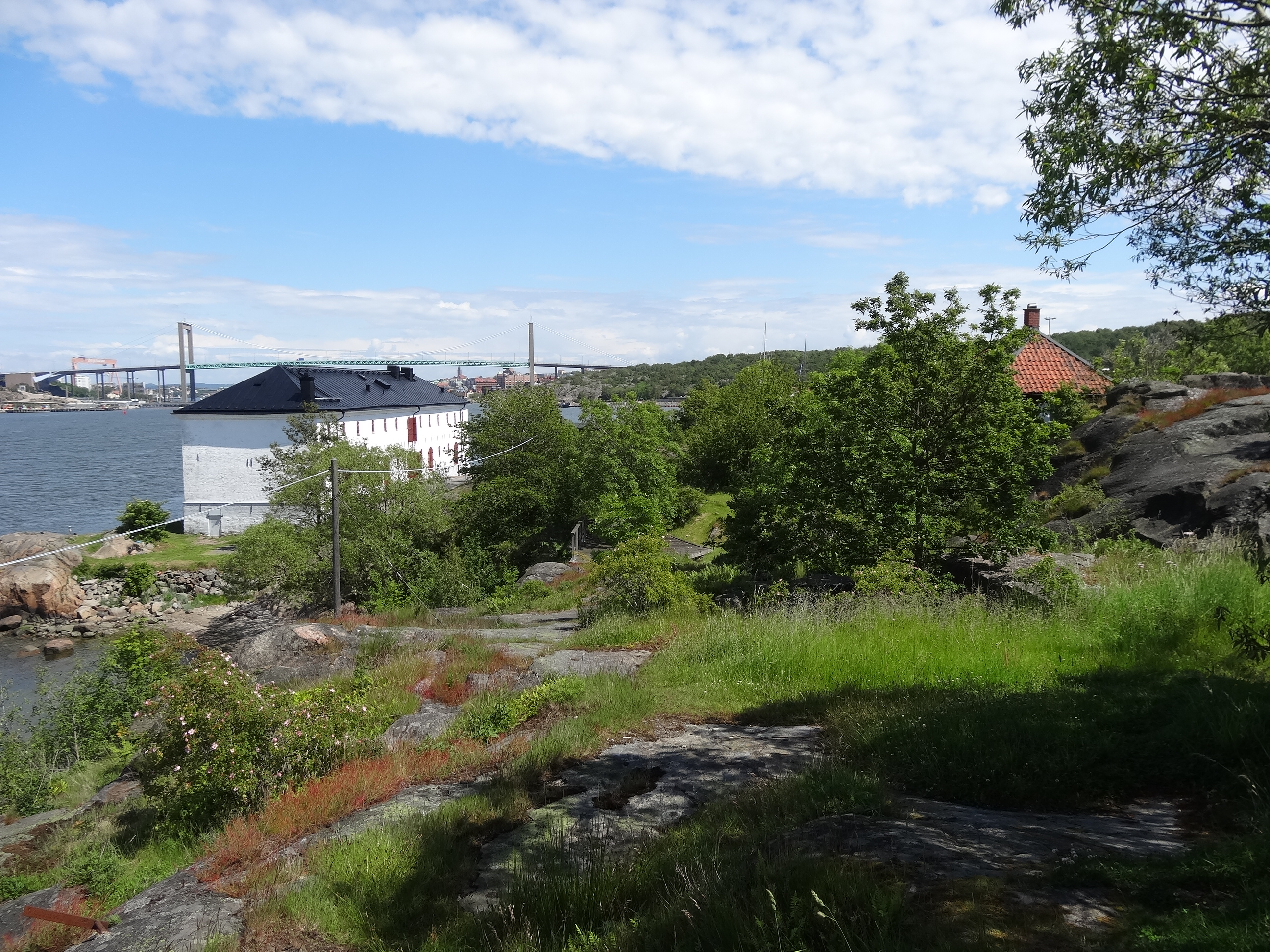 Lilla Billingen vid Nya Varvet, vy mot öster.